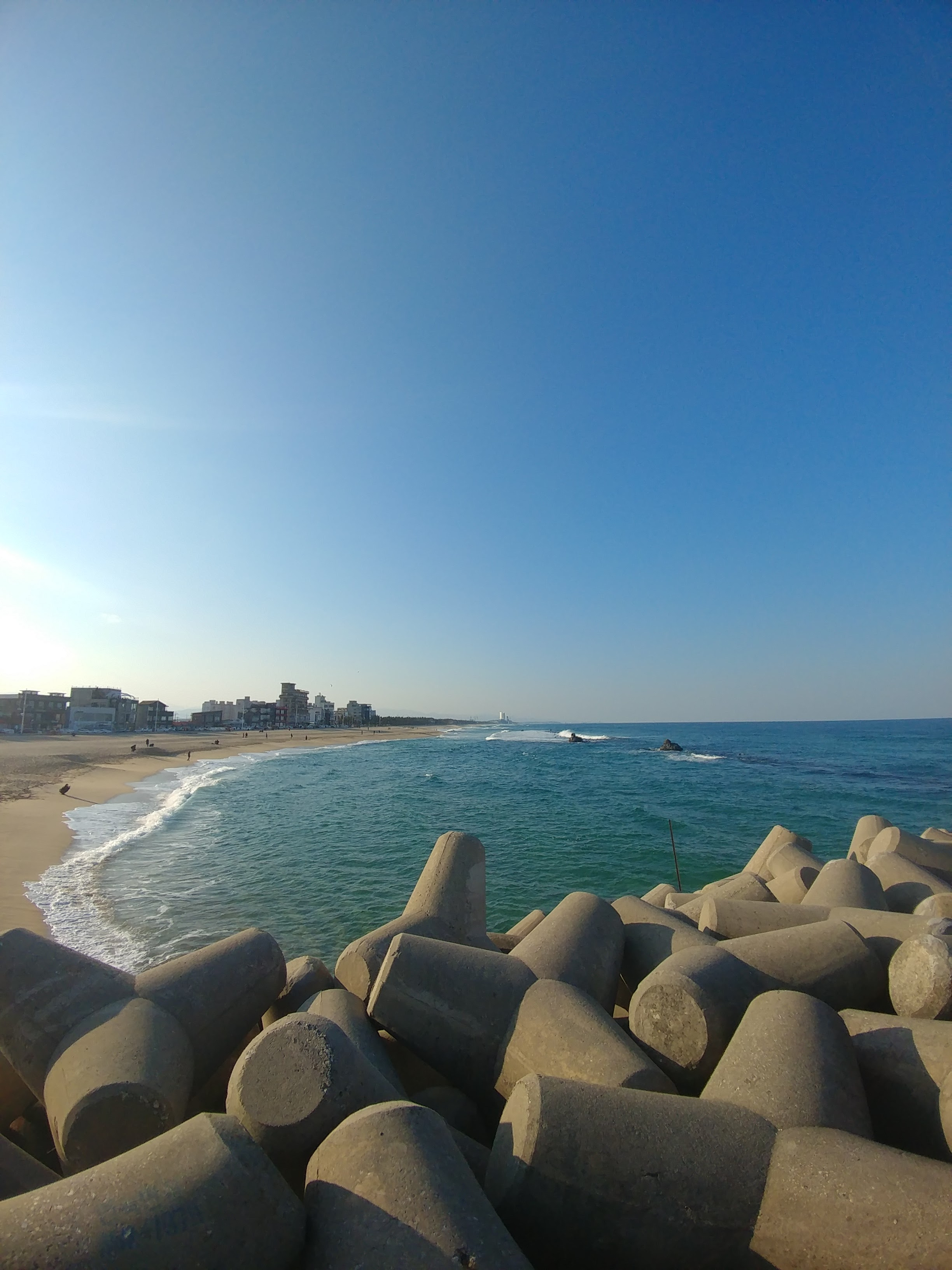 안목 바닷가